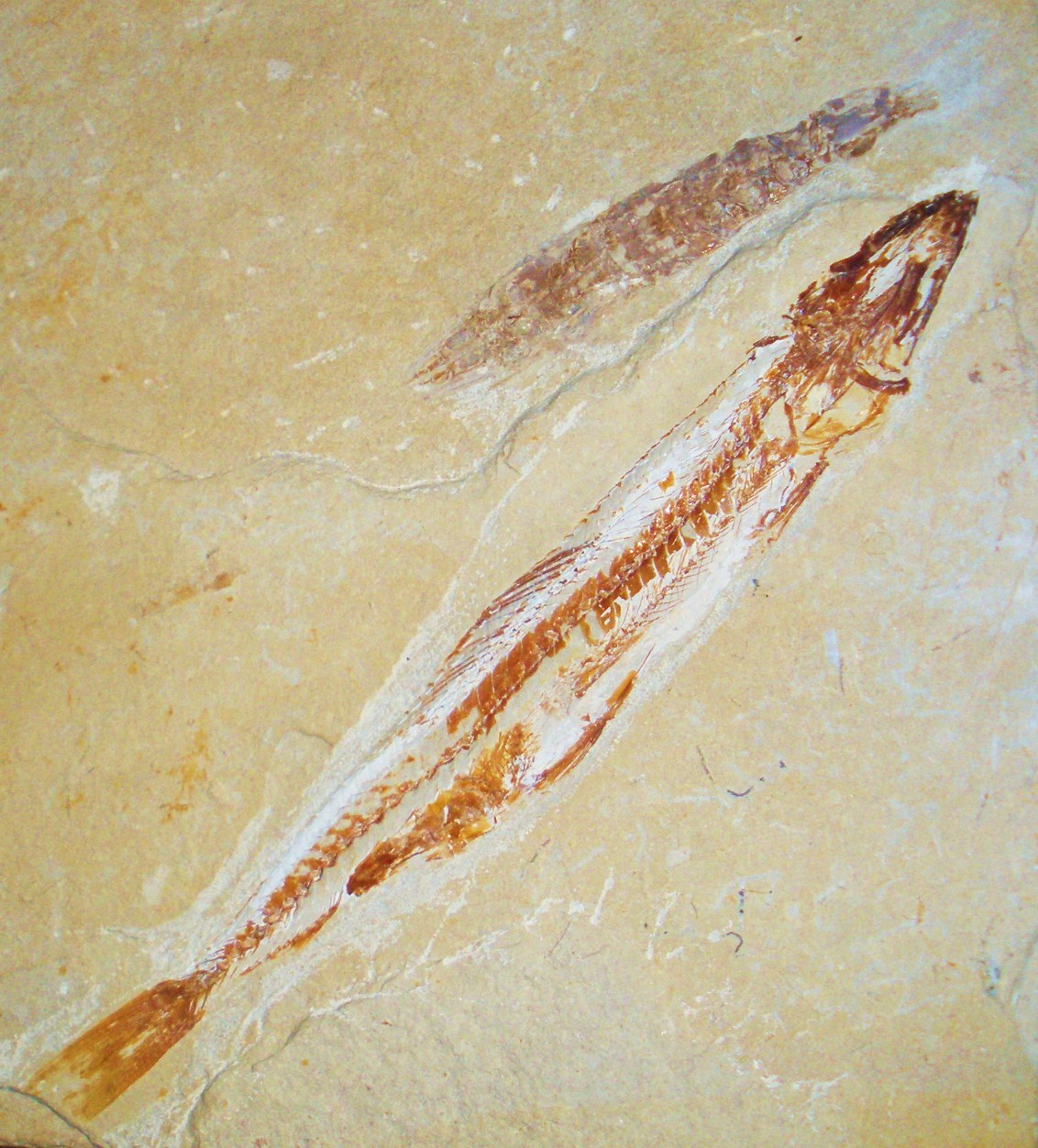 Fossil of Prionolepis, an extinct fish